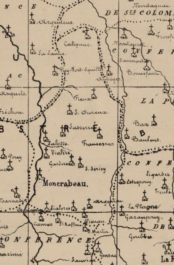 Extrèit de la mapa de la diocèsi de Condòm: Jean-Marie Cazauran (1845-1910). Diocèse de Condom au XVIIe siècle.